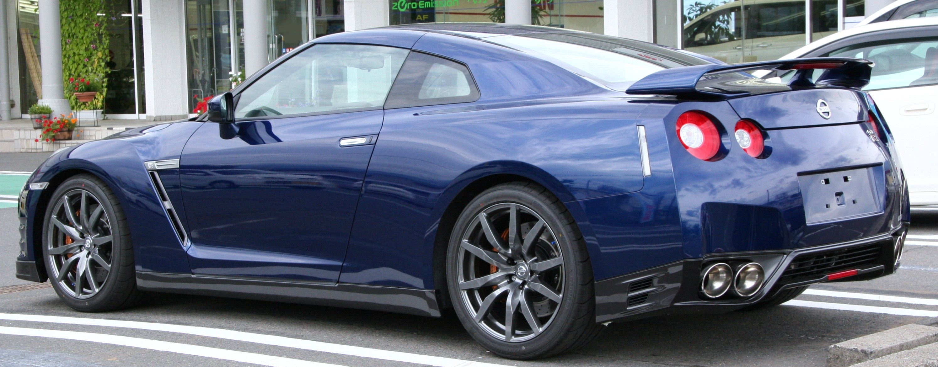 NISSAN GT-R